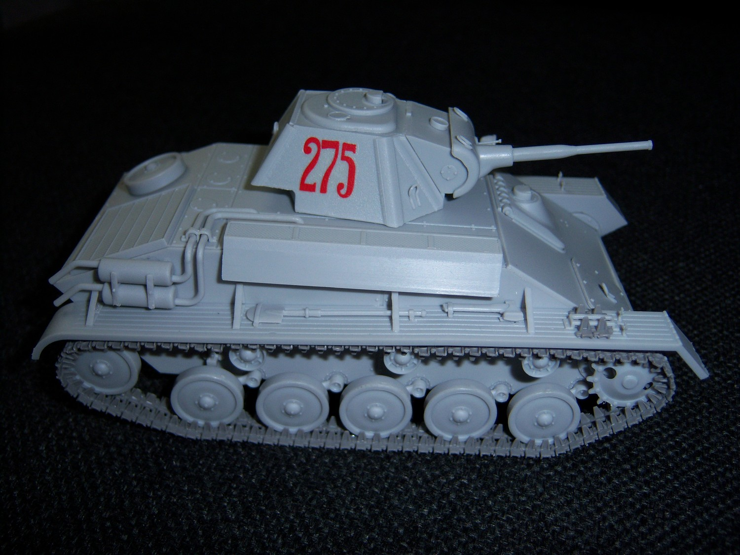 Неокрашенная сборная модель лёгкого танка Т-70 фирмы "МиниАрт", Симферополь